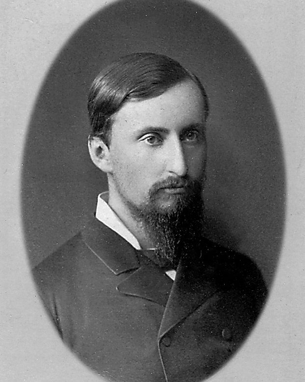 Шаховской, Дмитрий Иванович